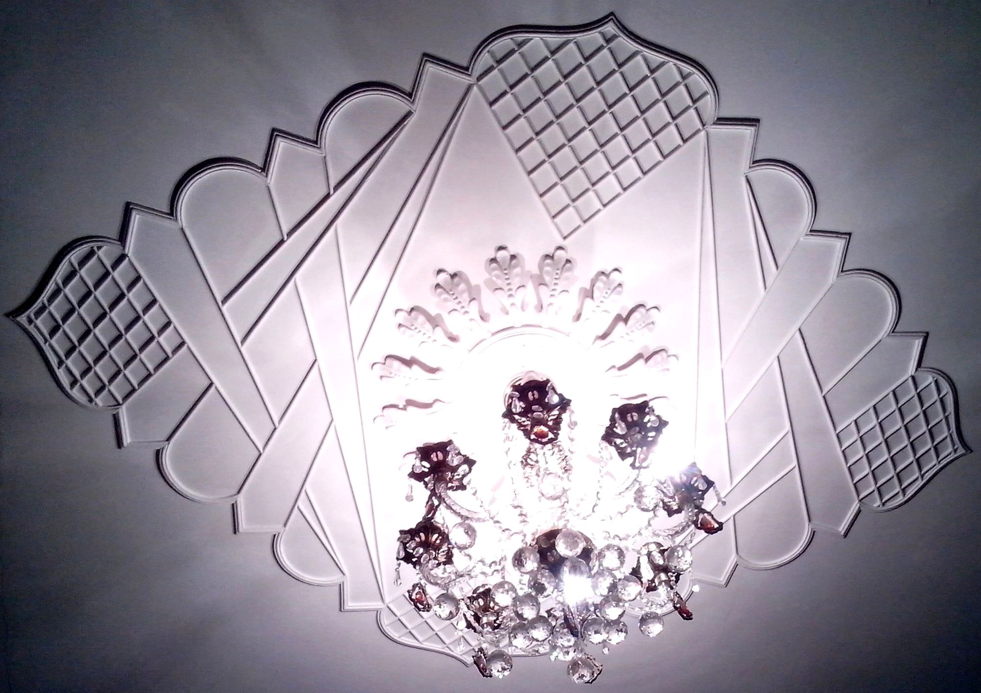 Çılçıraq